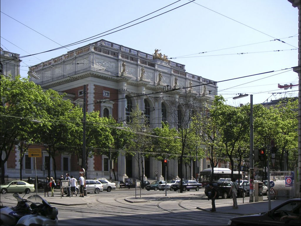 ehemaliges Gebäude der Wiener Börse an der Wiener Ringstrasse